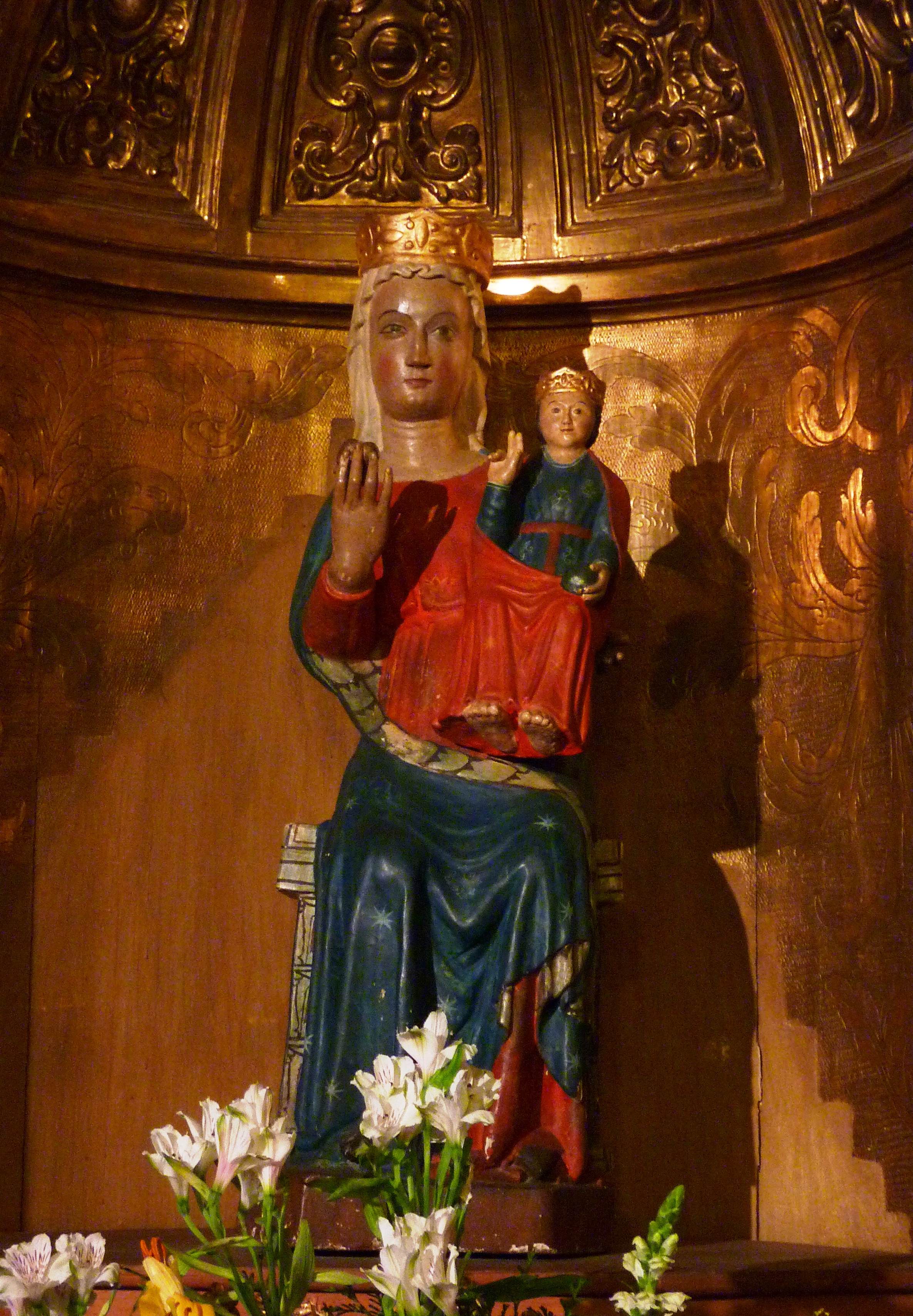 Virgen de la Soterraña, en la basílica de San Vicente (Ávila).